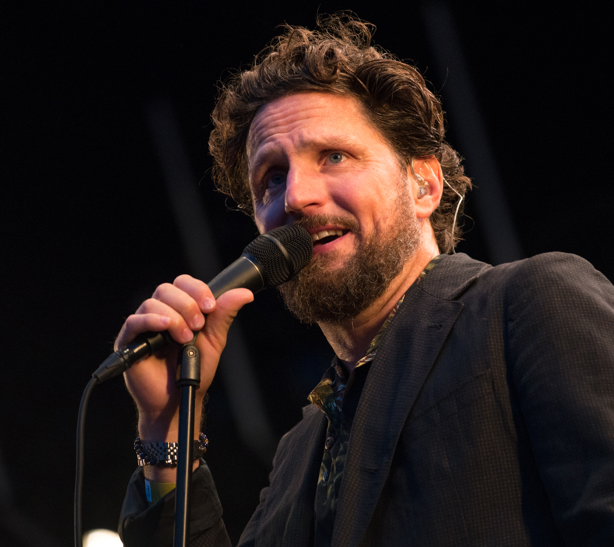 Anders Wendin (Moneybrother) under Stockholms Kulturfestival 2018.